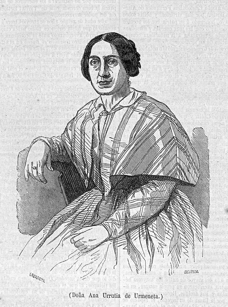 Doña Ana Urrutia de Urmeneta.